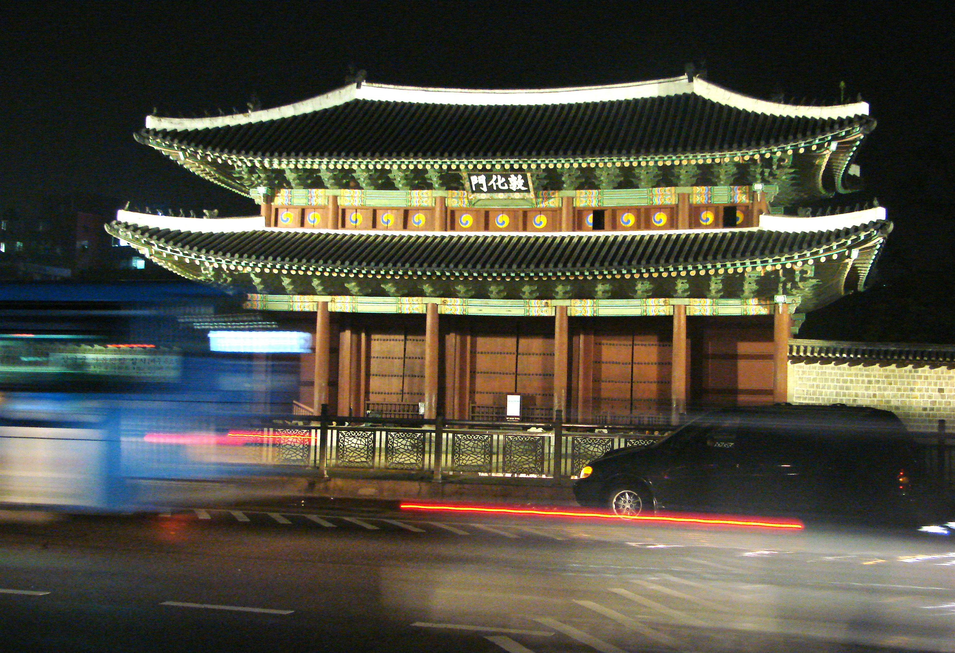 Changdeokgung Palace gate at night.